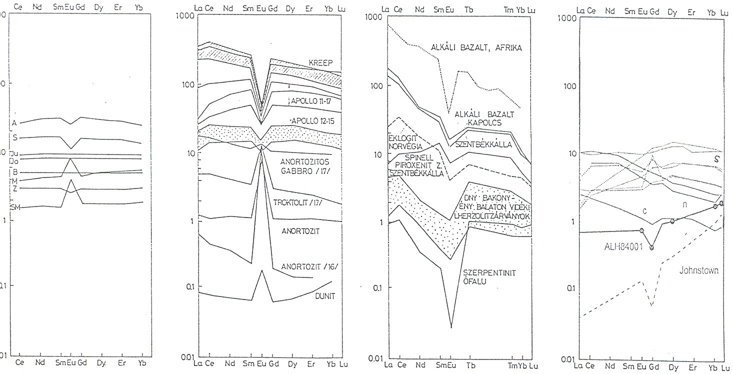 Négy ritka-földfém (RFF) gyakorisági diagram a kondritos értékekre normálva. Balról jobbra a kondritos kisbolygó bazaltjai, a Hold kőzetei, a Föld néhány kőzete (Szentbékkállai sorozat) és a Mars néhány meteoritja szerepel a négy oszlopban. A legdifferenciáltabb folyamatok a földi bazaltokat jellemzik, mert egy feltételezett kondritos kezdeti értékről (az 1-es vonal magasságában) parciális olvadással fölfelé is, és lefelé is igen változatos kőzettípusokat hoztak létre. Ezen a diagramon a Mars kőzetei ősi differenciálatlanságot mutatnak. Az s-sel jelölt shergottitok RFF gyakorisága a holdi Apolló 12 és 15 bazaltok magasságába esik. Az ALHA 84001 is ősi RFF gyakoriságot mutat.